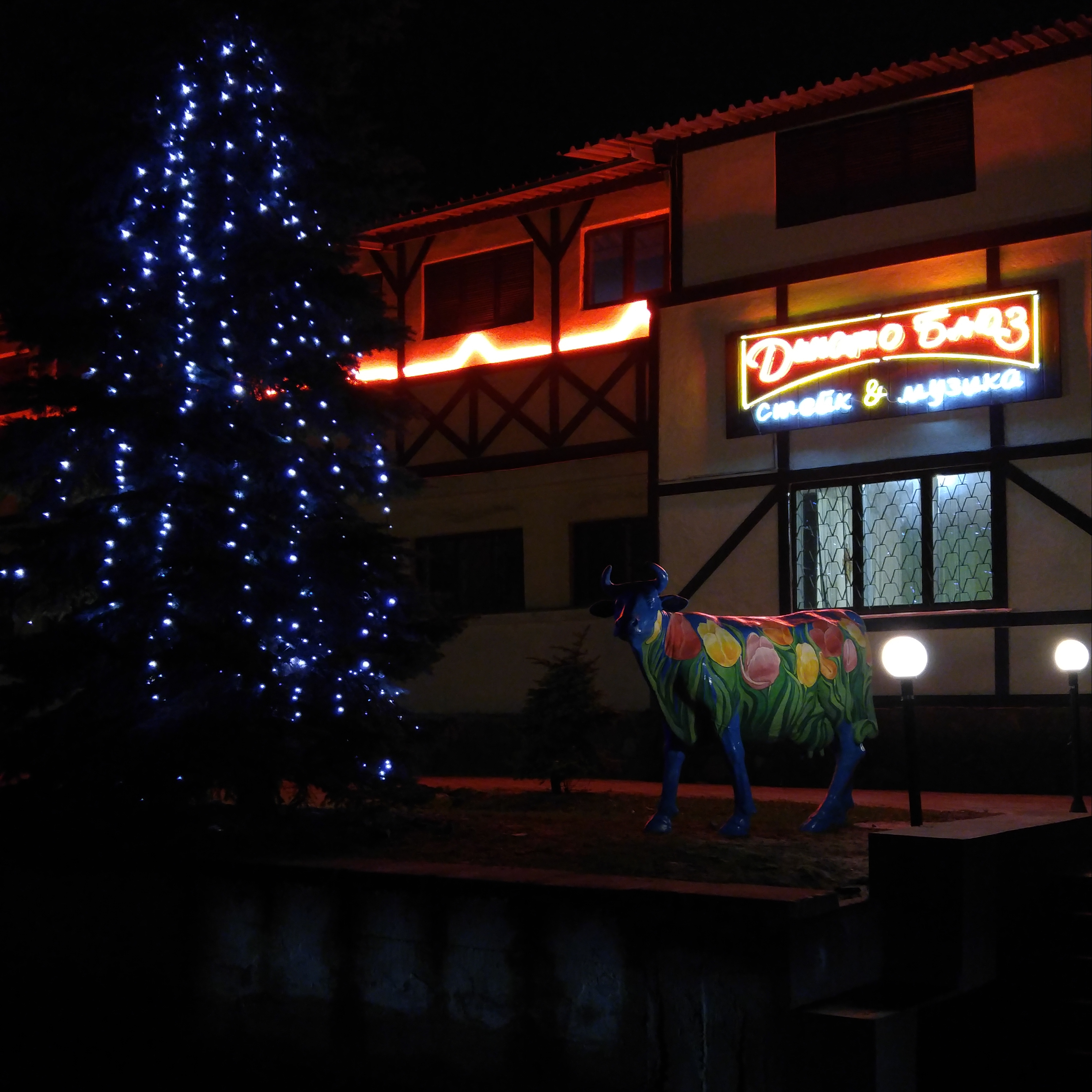 Скульптура "Музична Корова" біля входу ресторації "Динамо Блюз" на межі парку "Залізна Вода" і колишнього басейну з такою ж назвою. Україна, Львів, вул. В.Стуса, 4.